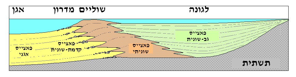 חתך כללי במשטח קרבונטי